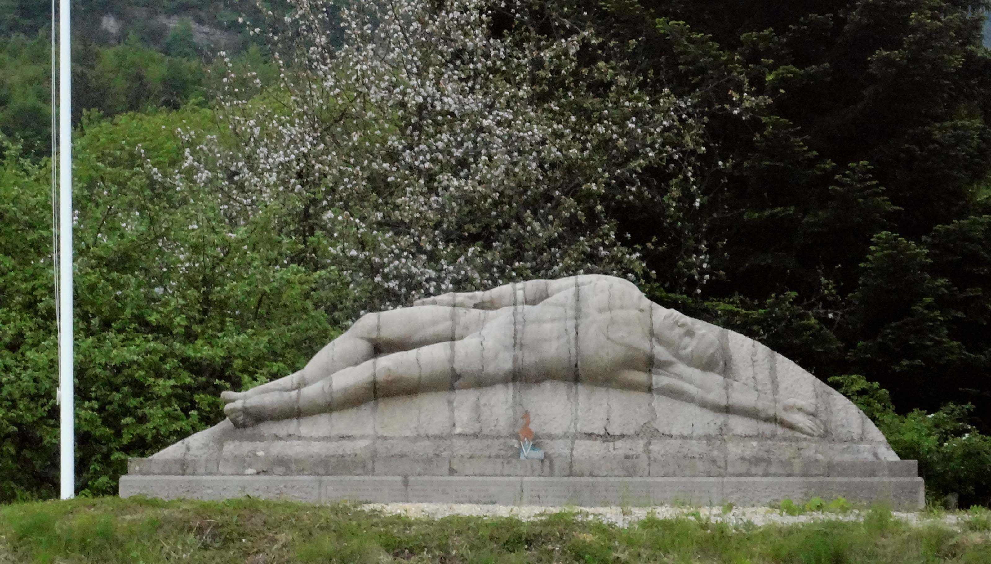 Sculpture "Le gisant", œuvre du sculpteur Michel Chauvet (1947) qui se trouve à Malleval-en-Vercors.